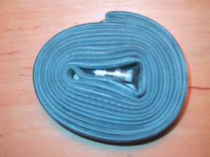 zwinięta (prosto z pudełka) dętka rowerowa 28/40-609/630